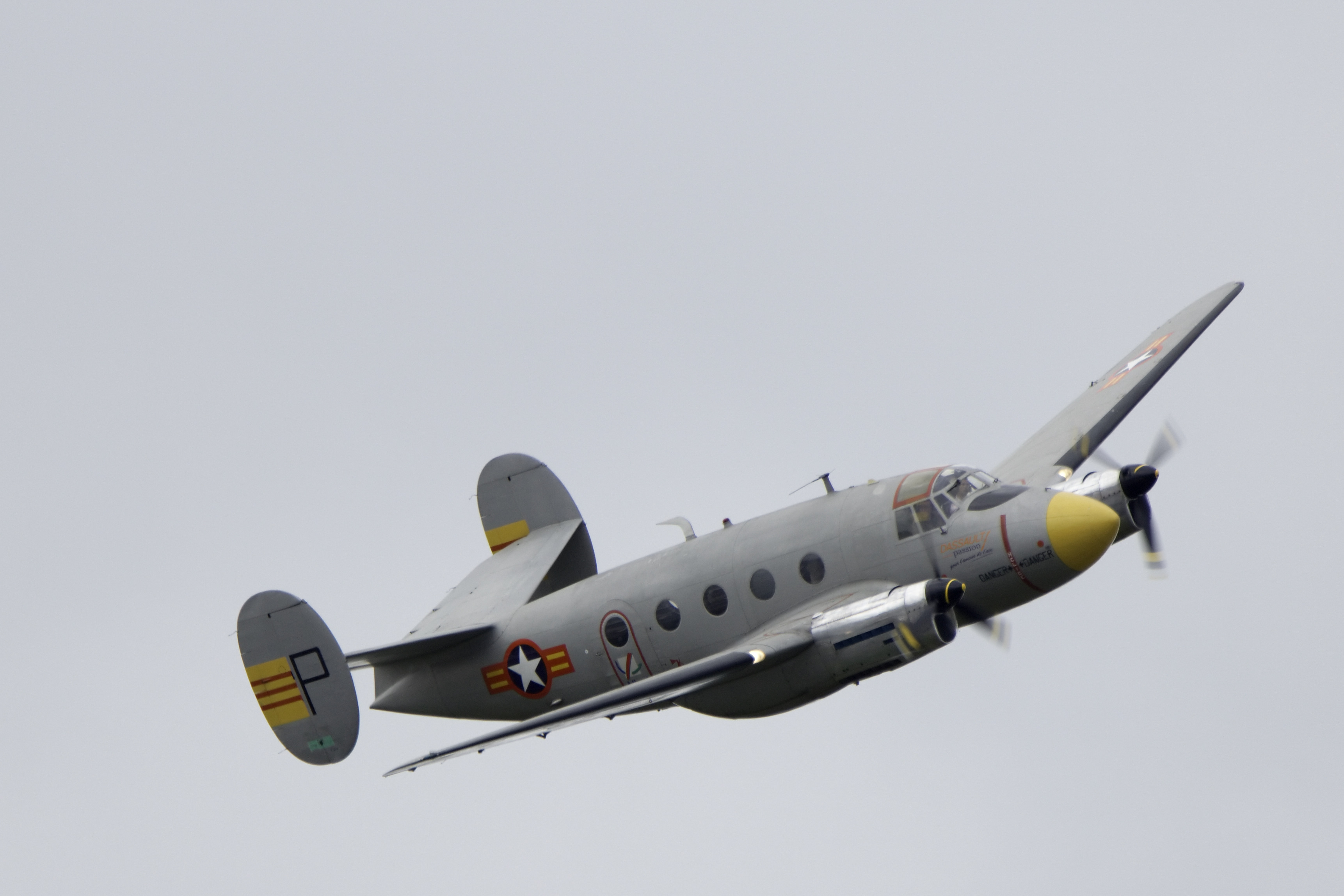 Dassault Flamant MD311 / MD312 at ILA 2010